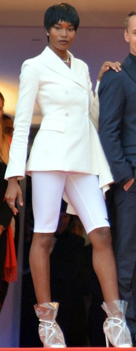 Présentation du film "BlacKkKlansman" au festival de Cannes : Damaris Lewis.